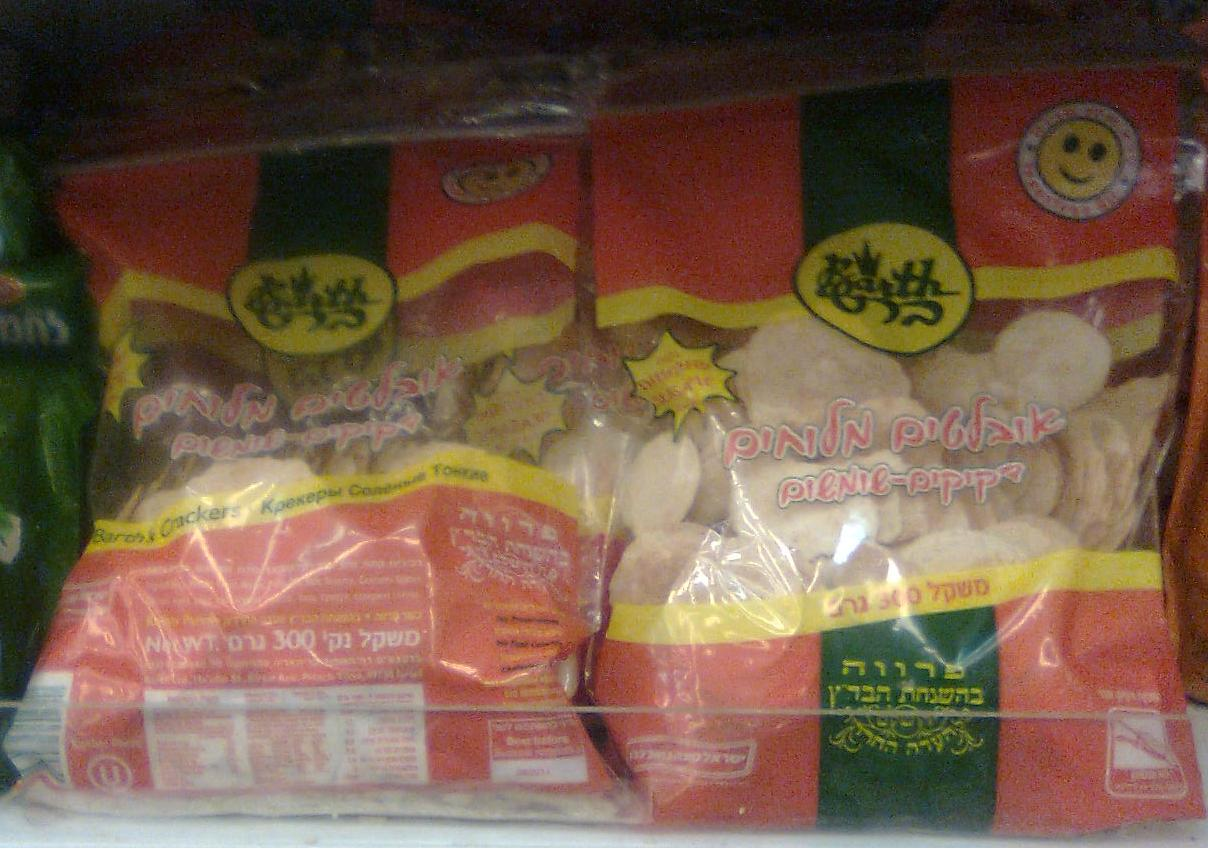 אובלטים מתוצרת ברט